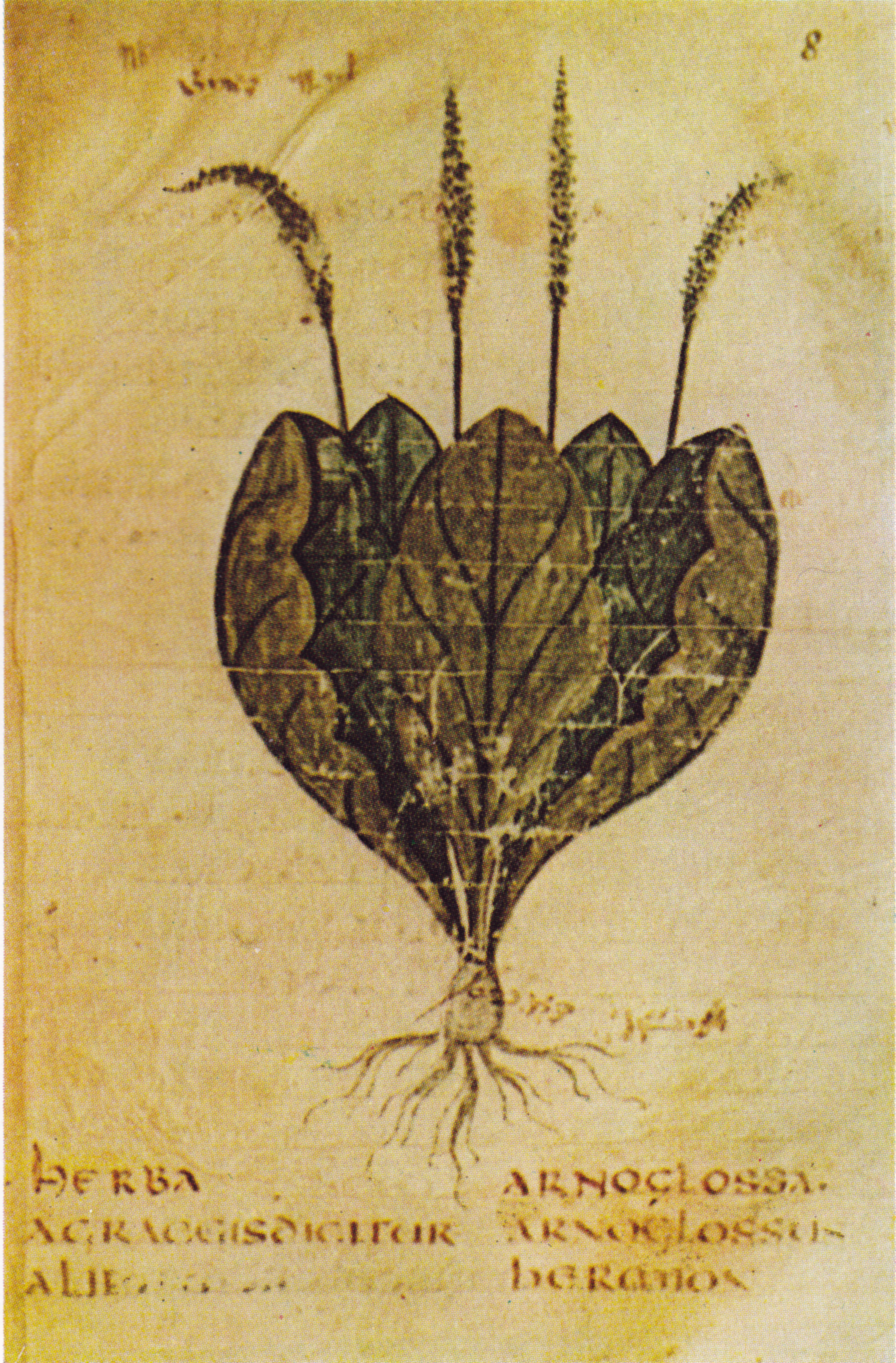 Abbildung von Herba Arnoglossa im Pseudo-Apuleius